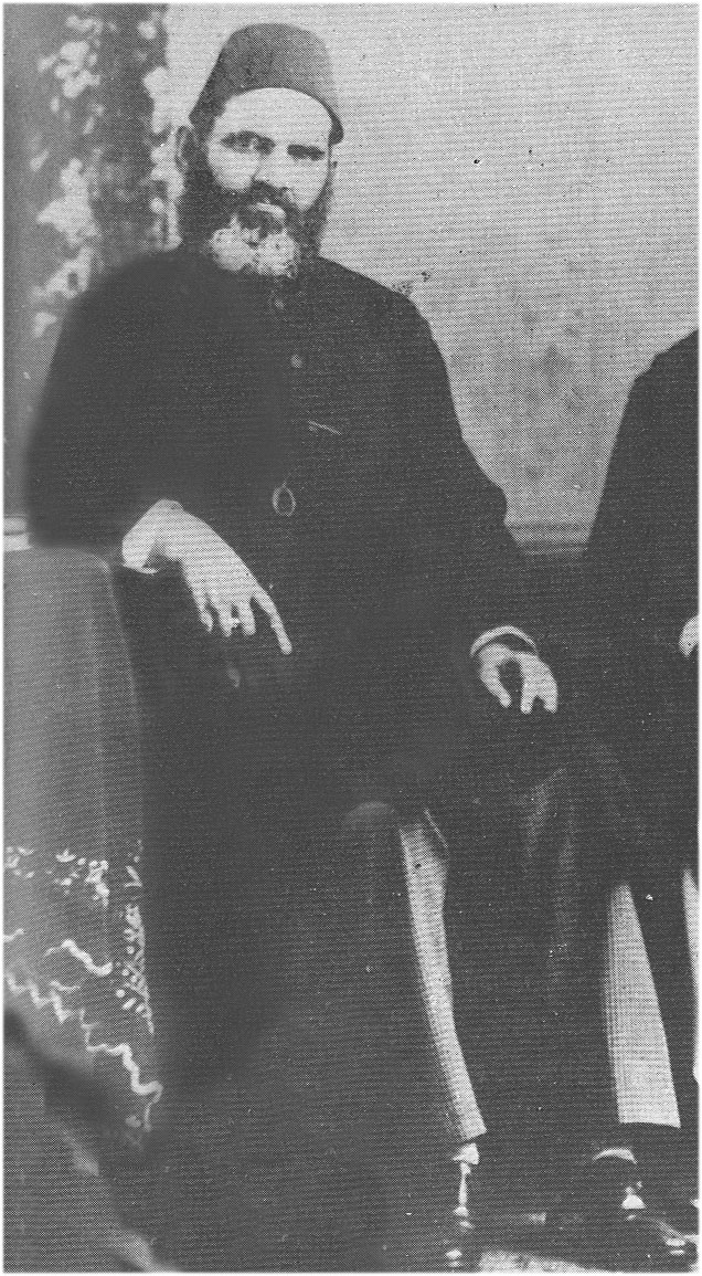 Nawab Mohsin ul Mulk (1837 — 1907)